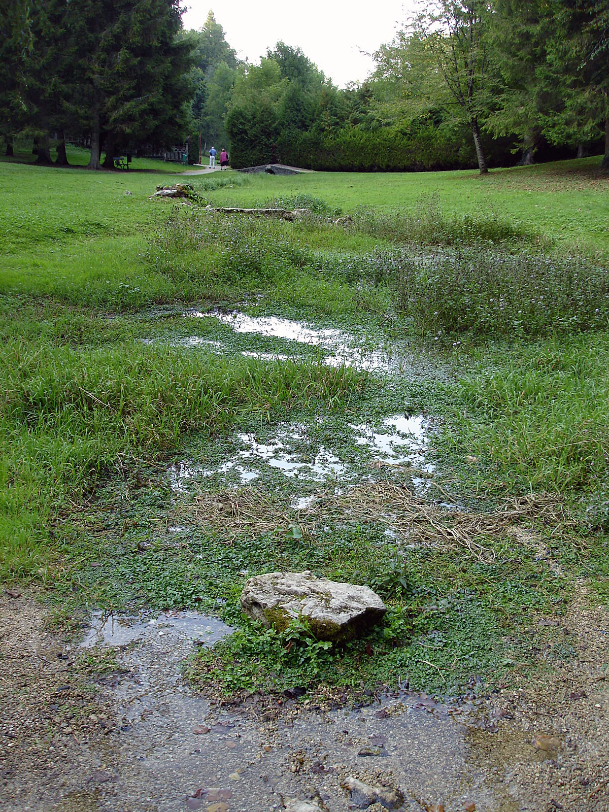 Source de la Seine, Saint-Germain-Source-Seine, Côte-d'Or, France.